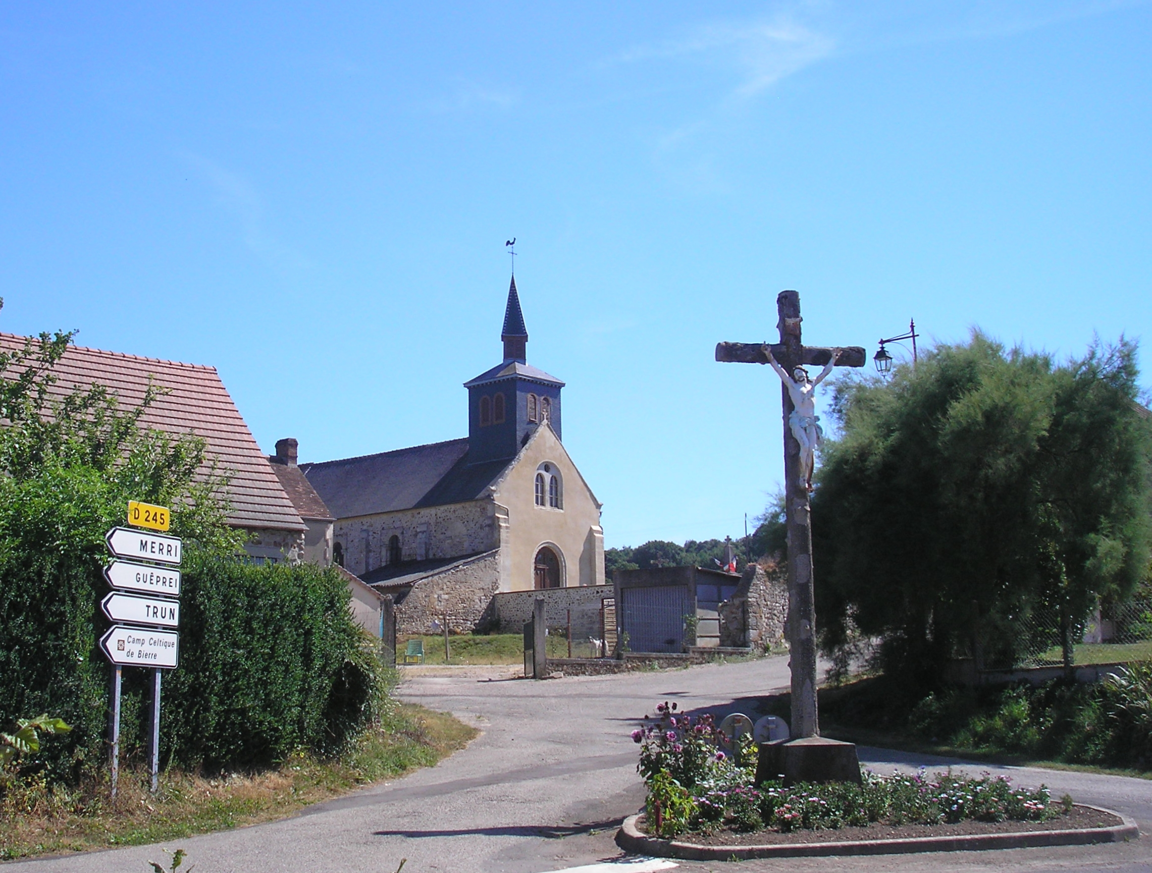 Brieux (Normandie, France). L'église Notre-Dame.